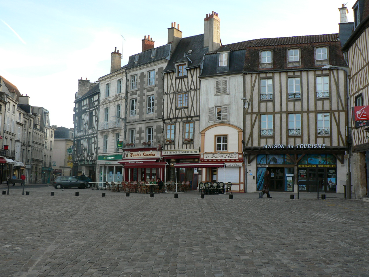 Description: Poitiers Devant Notre Dame la Grande Photographer/illustrator: Eyone Uploader: Eyone Date & location: 16 april 2006 - Poitiers, France